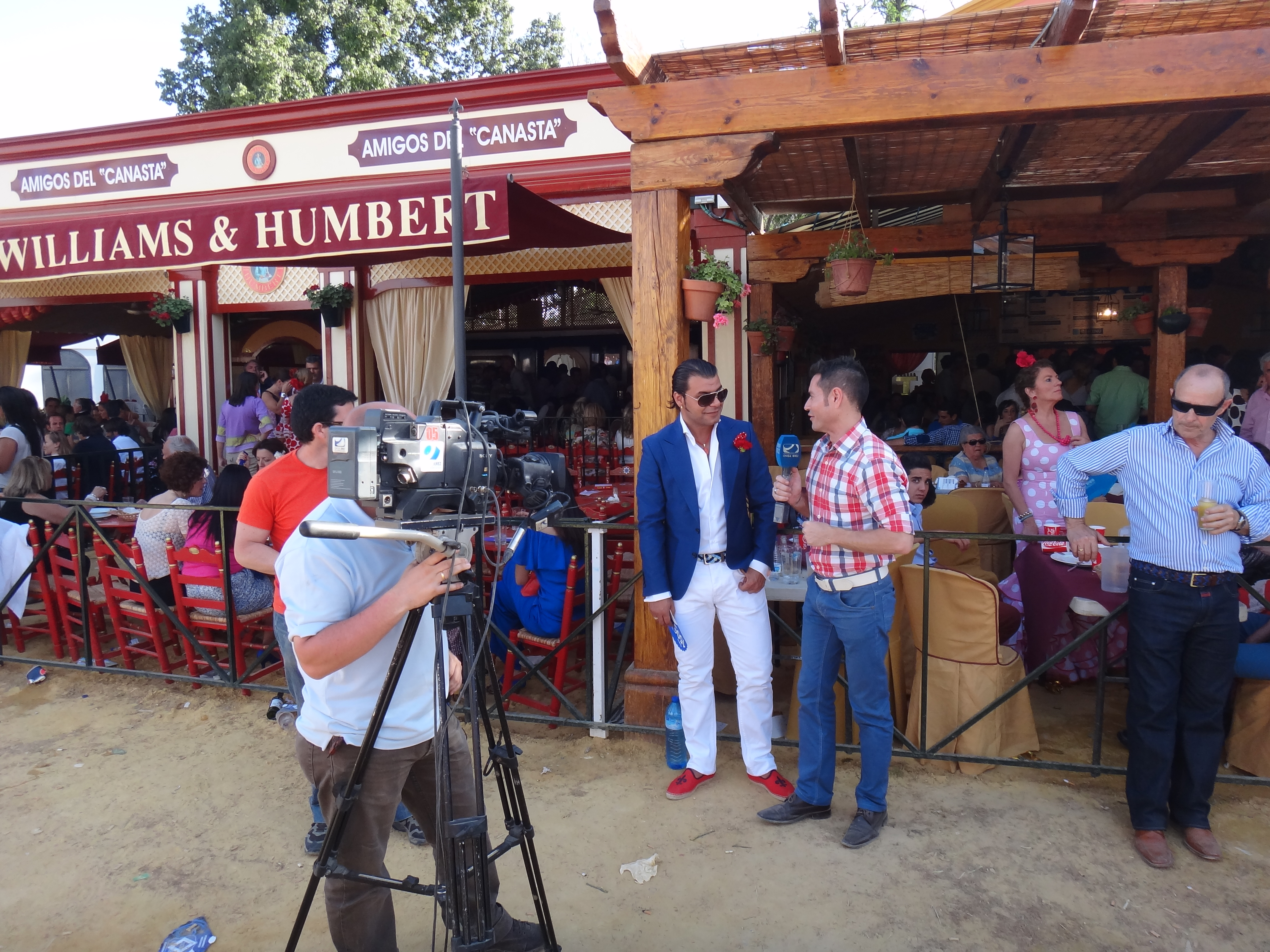 Equipo de Onda Jerez realizando una entrevista al bailaor flamenco Fernando Jiménez en la Feria del Caballo de Jerez 2012